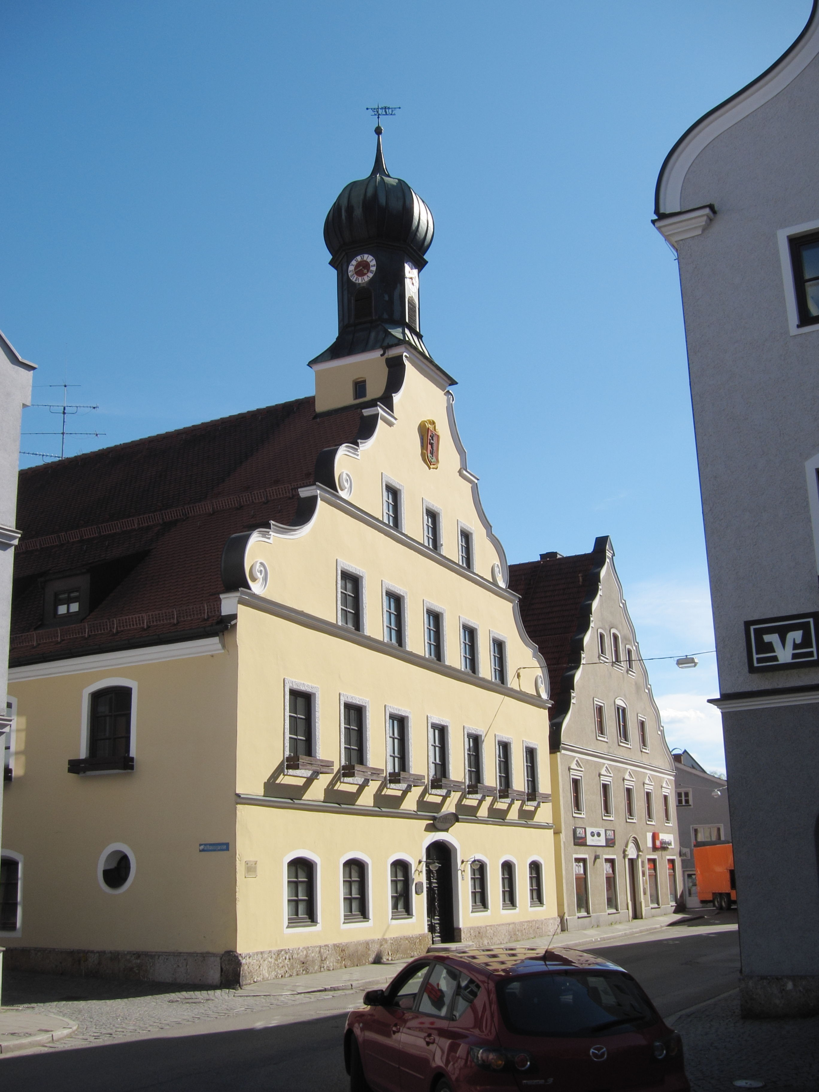 Marktplatz 28; Rathaus; stattlicher Giebelbau mit barocken Putzgliederungen, nach Brand 1766 neu errichtet, Schweifgiebel nach 1905, moderner Ausbau 1978/79.